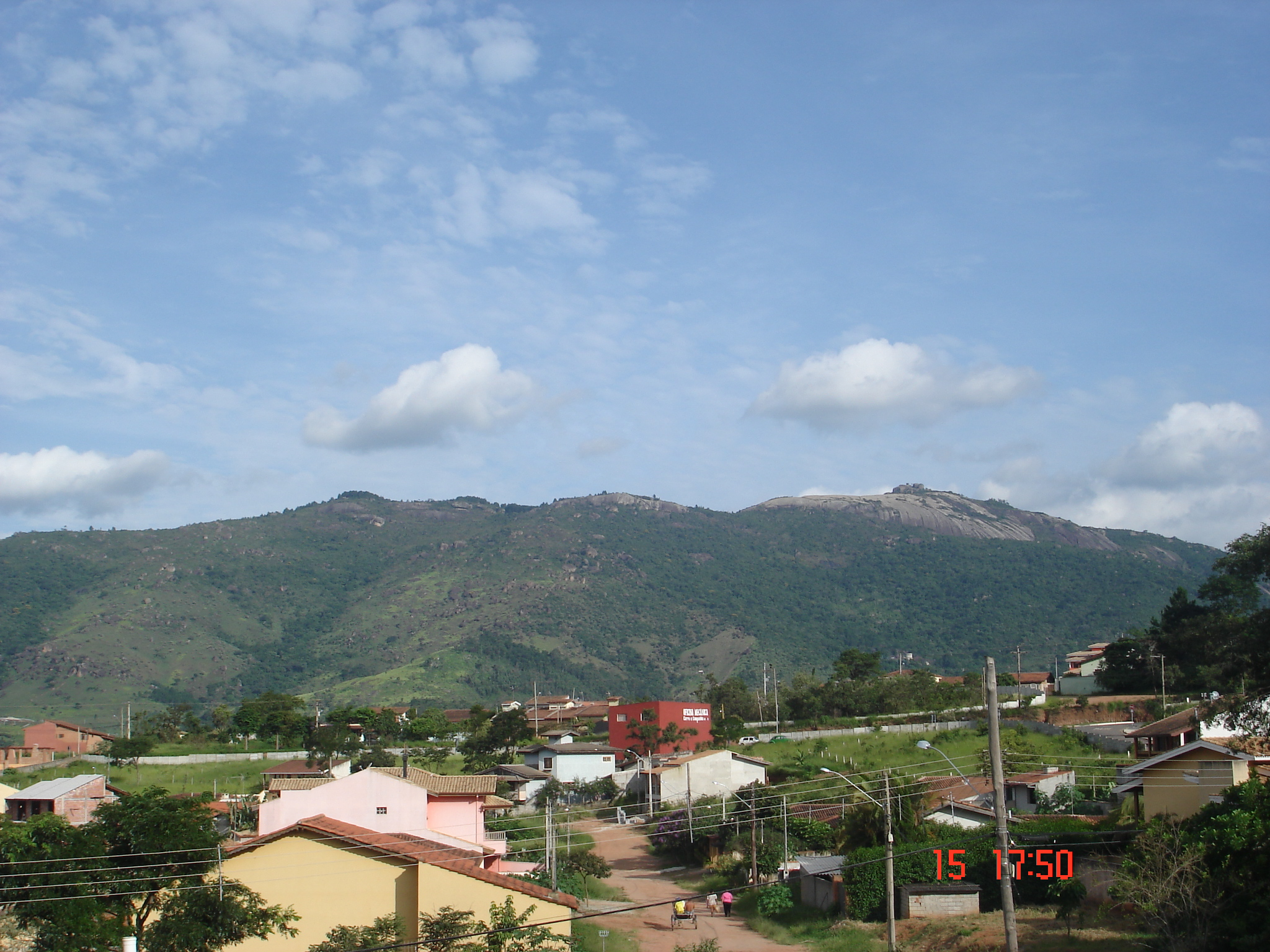 Montanha Pedra Grande em Atibaia